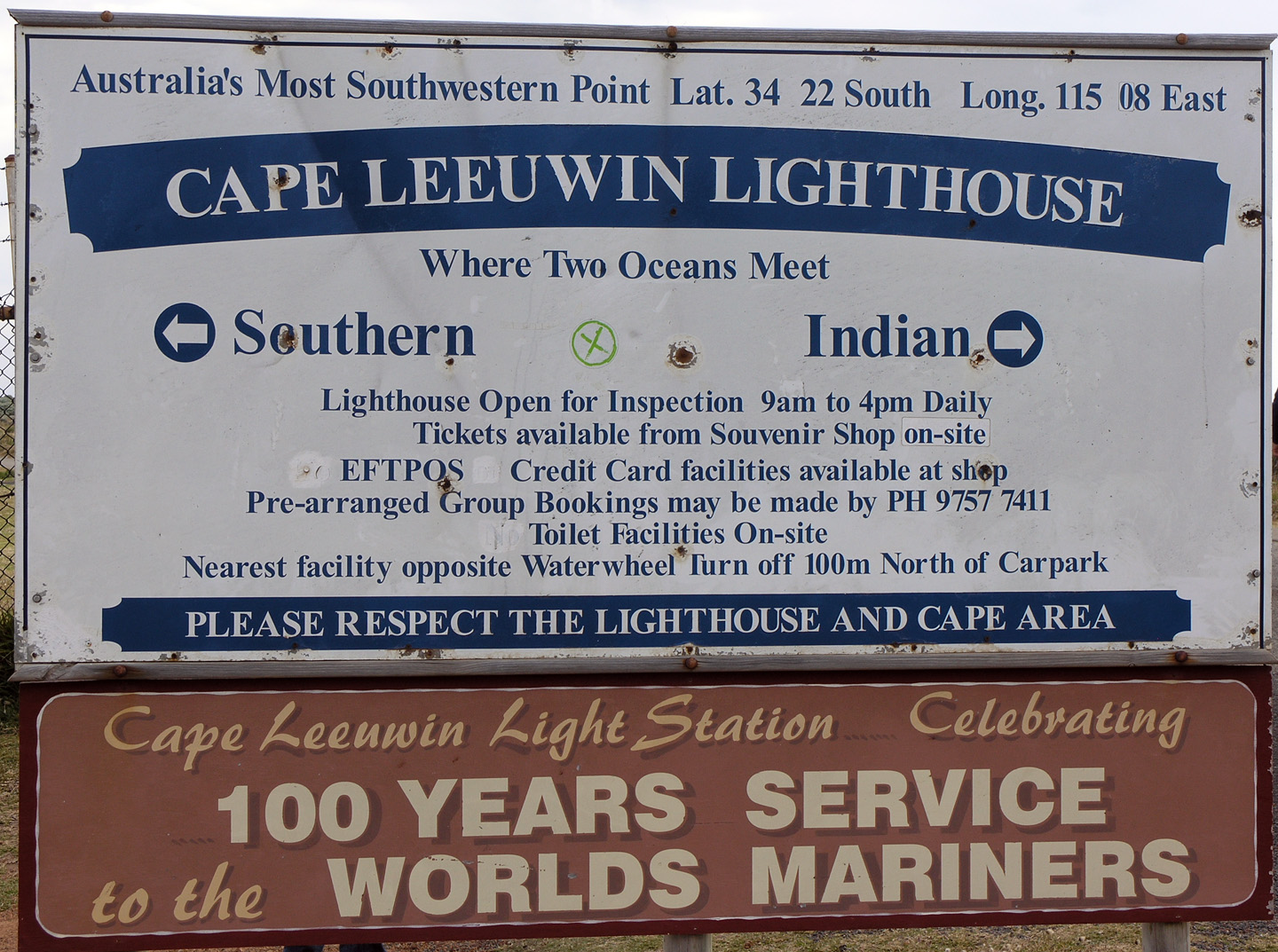 Placa en el Faro Cabo Leeuwin. Sign at Cape Leeuwin lighthouse, western australia, taken by myself.